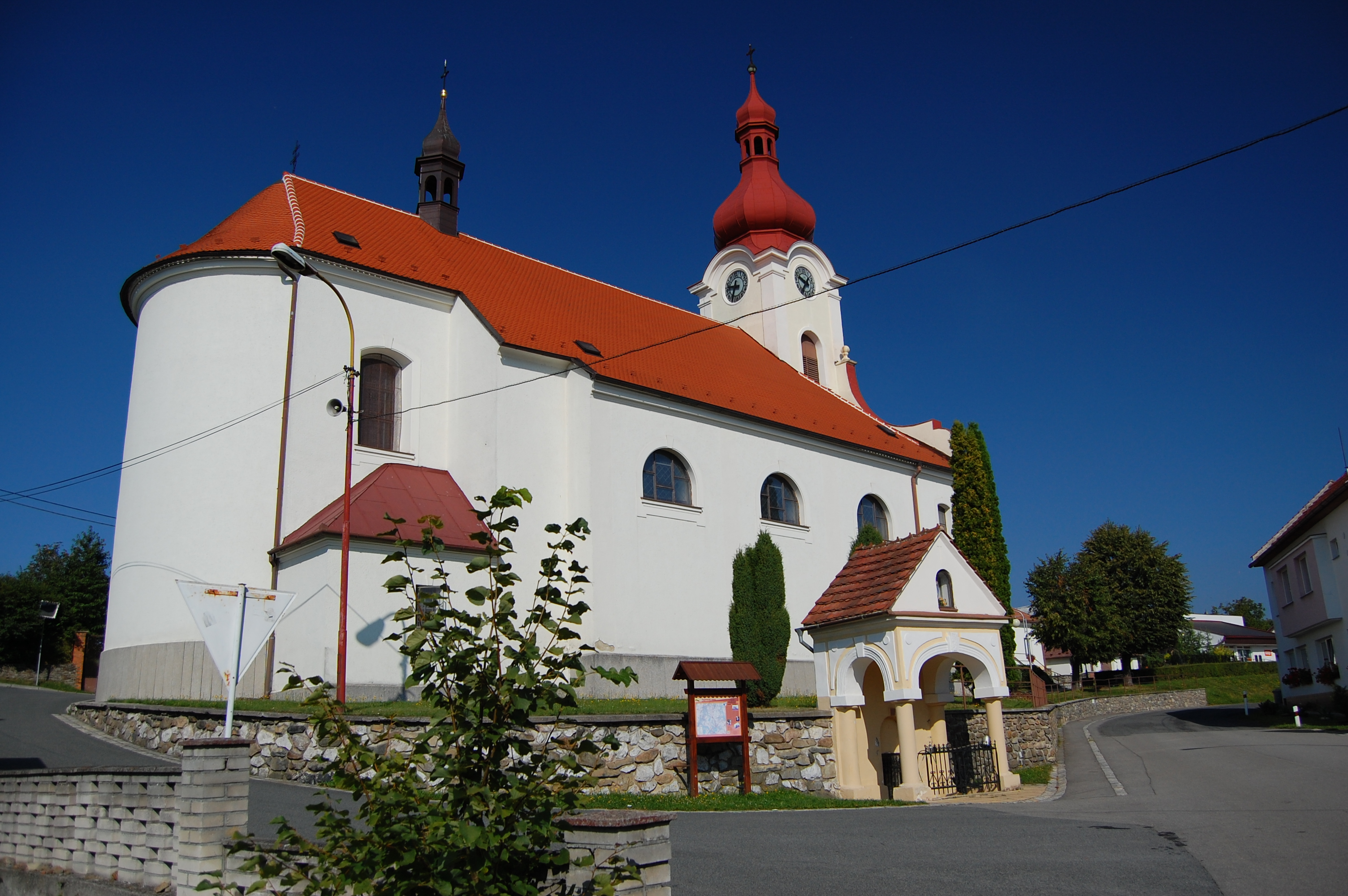 Kostel Navštívení Panny Marie v Jednově, Suchdol, okres Prostějov